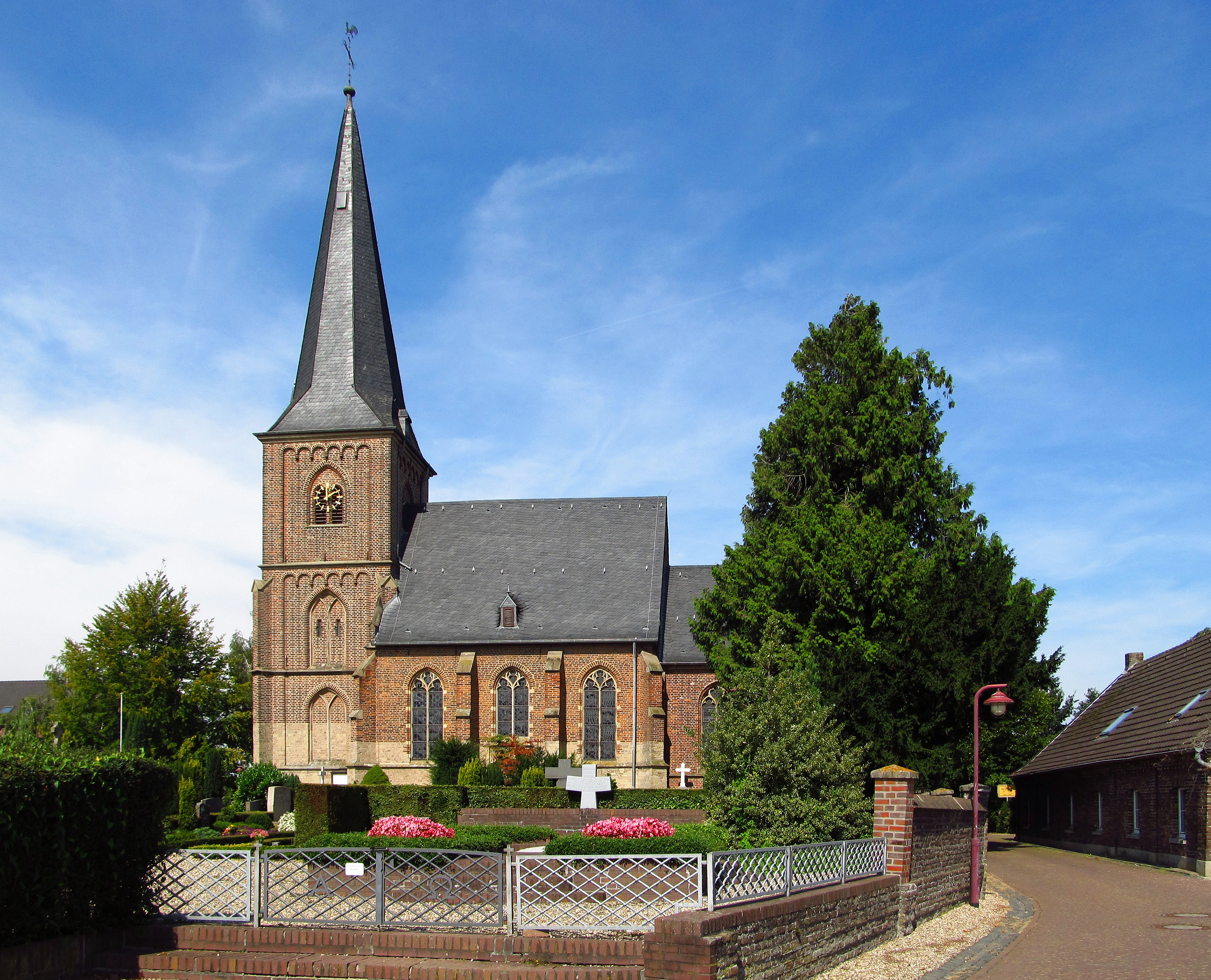 Kirche St. Willibrordus in Wardt , im Vordergrund der Friedhof. Mein Standort: Kerkend, Blick Richtung Norden. Photo: 02.09.2012, Wardt, Stadt Xanten, Kreis Wesel.